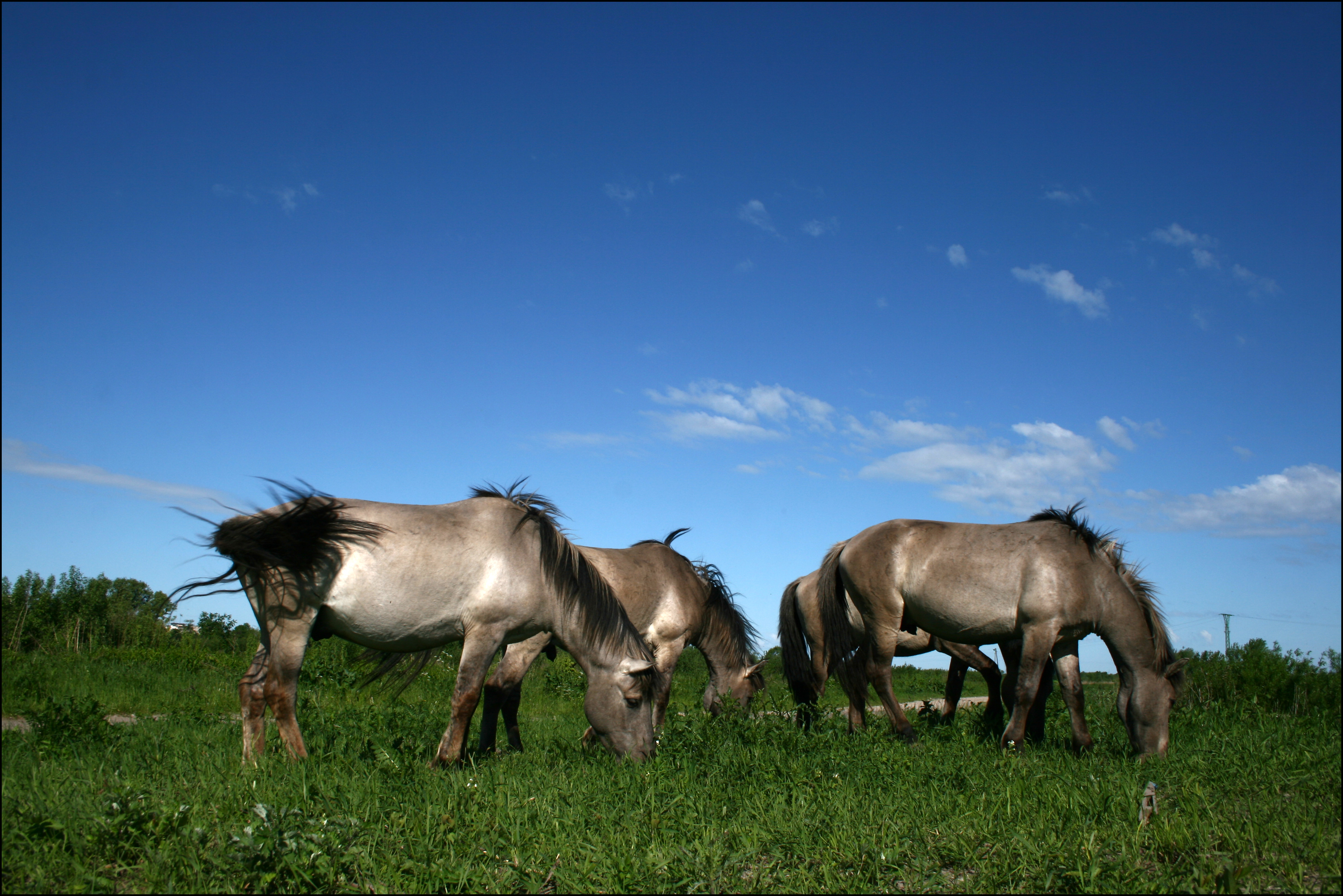 Feral horses, Jelgava